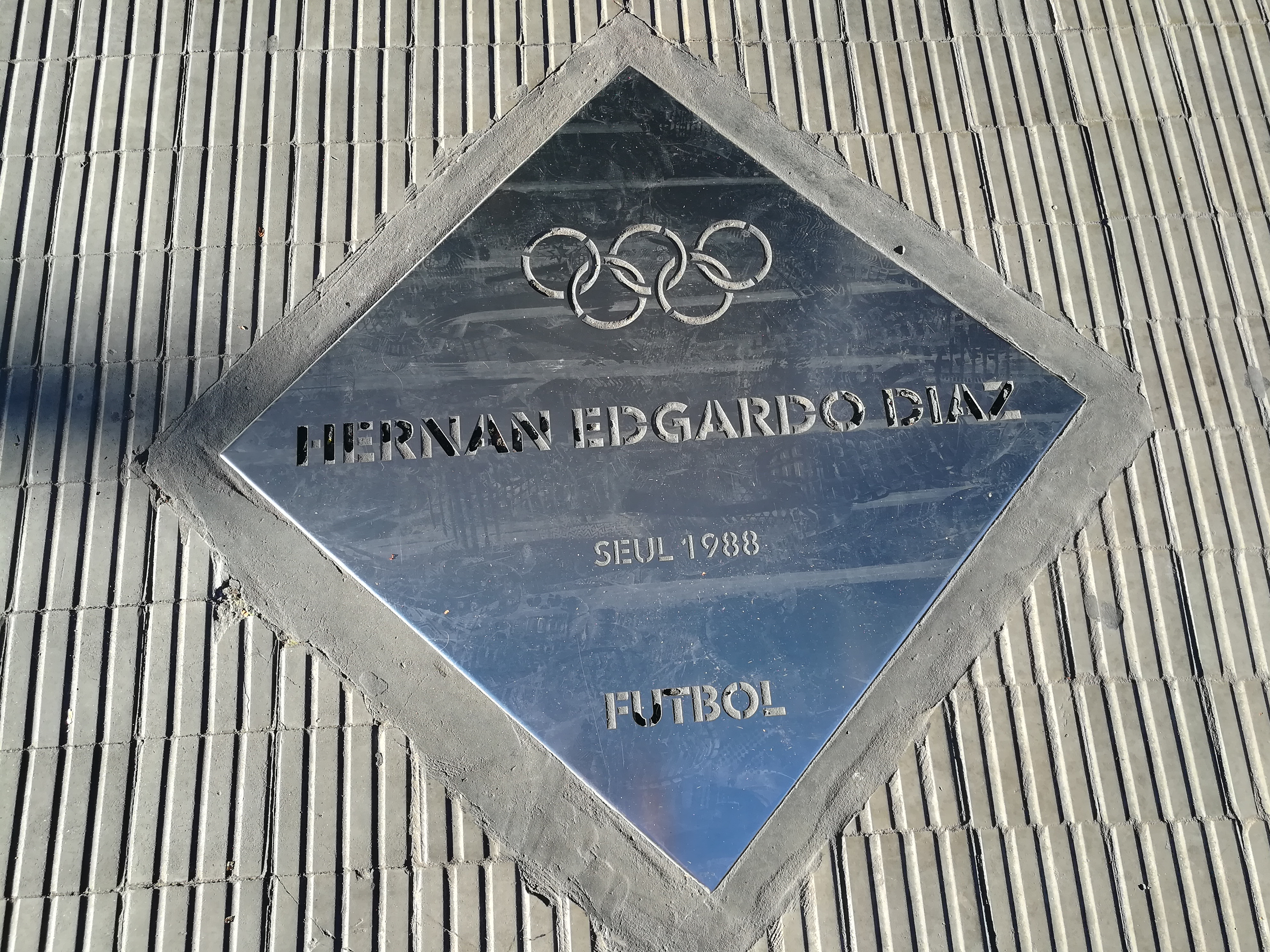 Paseo de los Olímpicos de los en la Avenida Pellegrini (Rosario).